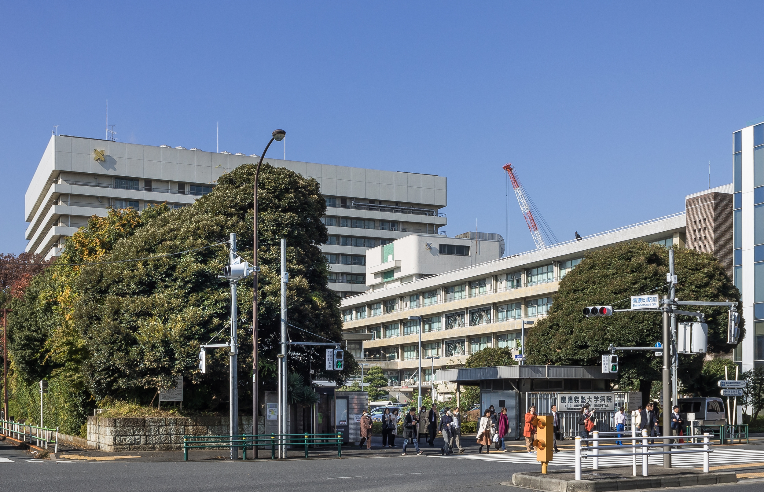 慶応大学病院（東京都新宿区）